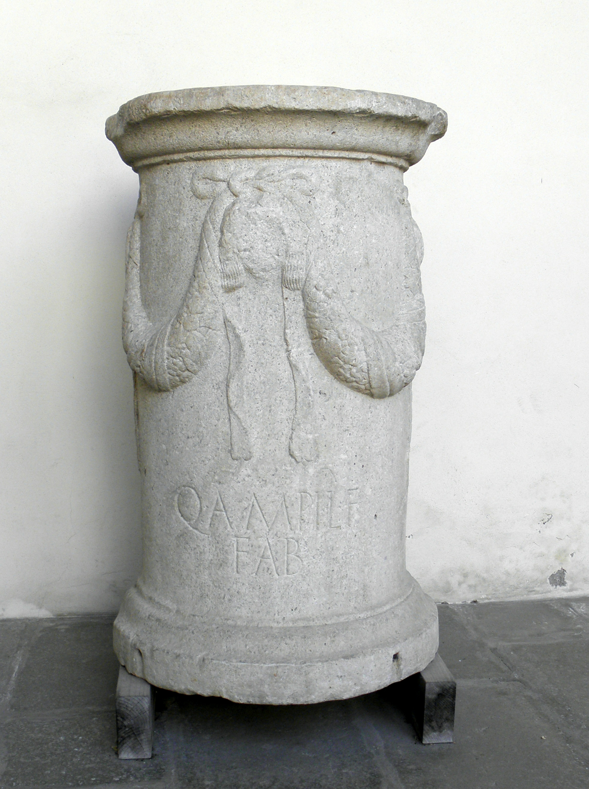 Rovigo, Museo dei Grandi Fiumi: cippo funerario esposto nel chiostro dell'ex monastero degli Olivetani, ora sede del museo.